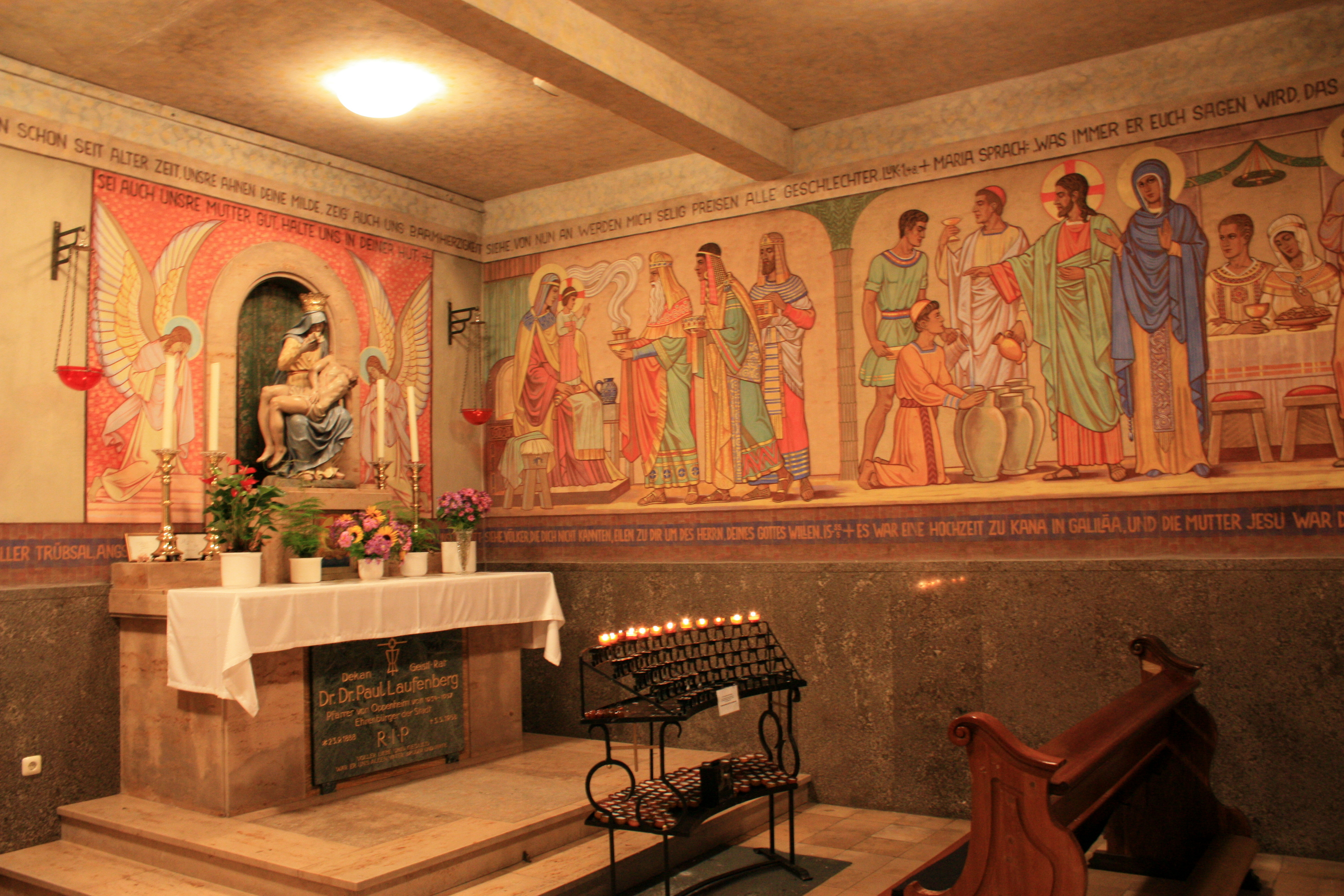 Interieur Marienkapelle in der Bartholomäuskirche in Oppenheim, Grabmal von Dr. Dr. Paul Laufenberg, Pfarrer von Oppenheim von 1954-1957, Ehrenbürger der Stadt